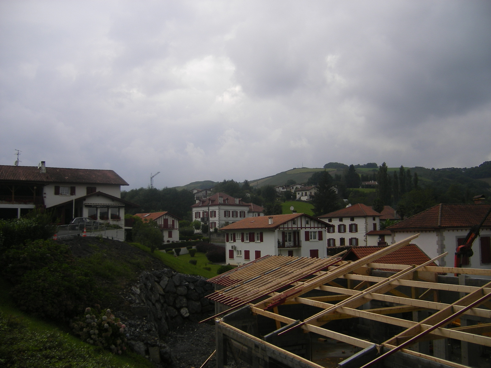 Louhosspa